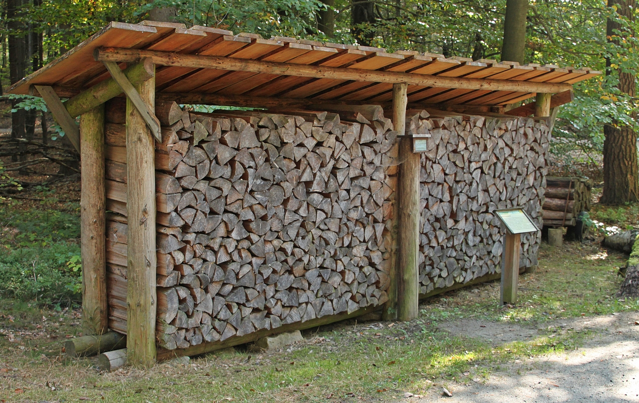 Hinterhermsdorf, Walderlebniszentrum "Waldhusche": Nachbau der Holzmenge eines "Schragens", eines alten sächsischen Volumenmaßes für Holz.